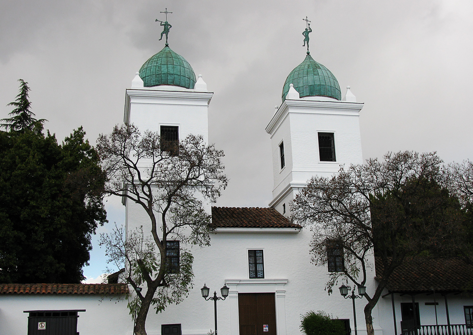 Iglesia de San Vicente Ferrer de Los Dominicos This is a photo of a national monument in Chile: 851